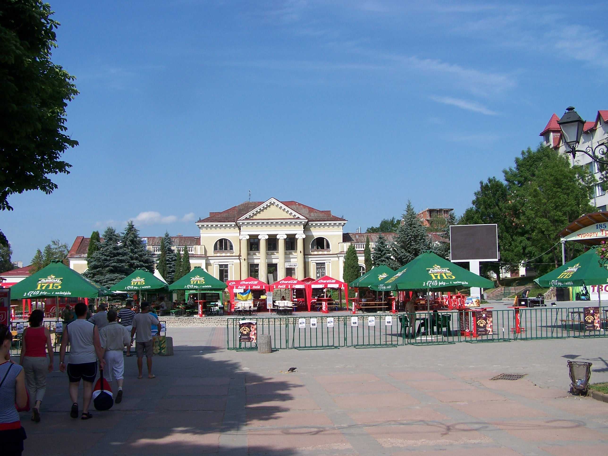 Truskavets, Lviv Oblast, Ukraine, 82200